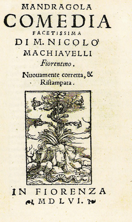 Copertina originale della prima stampa del testo di Nicolo Machiavelli